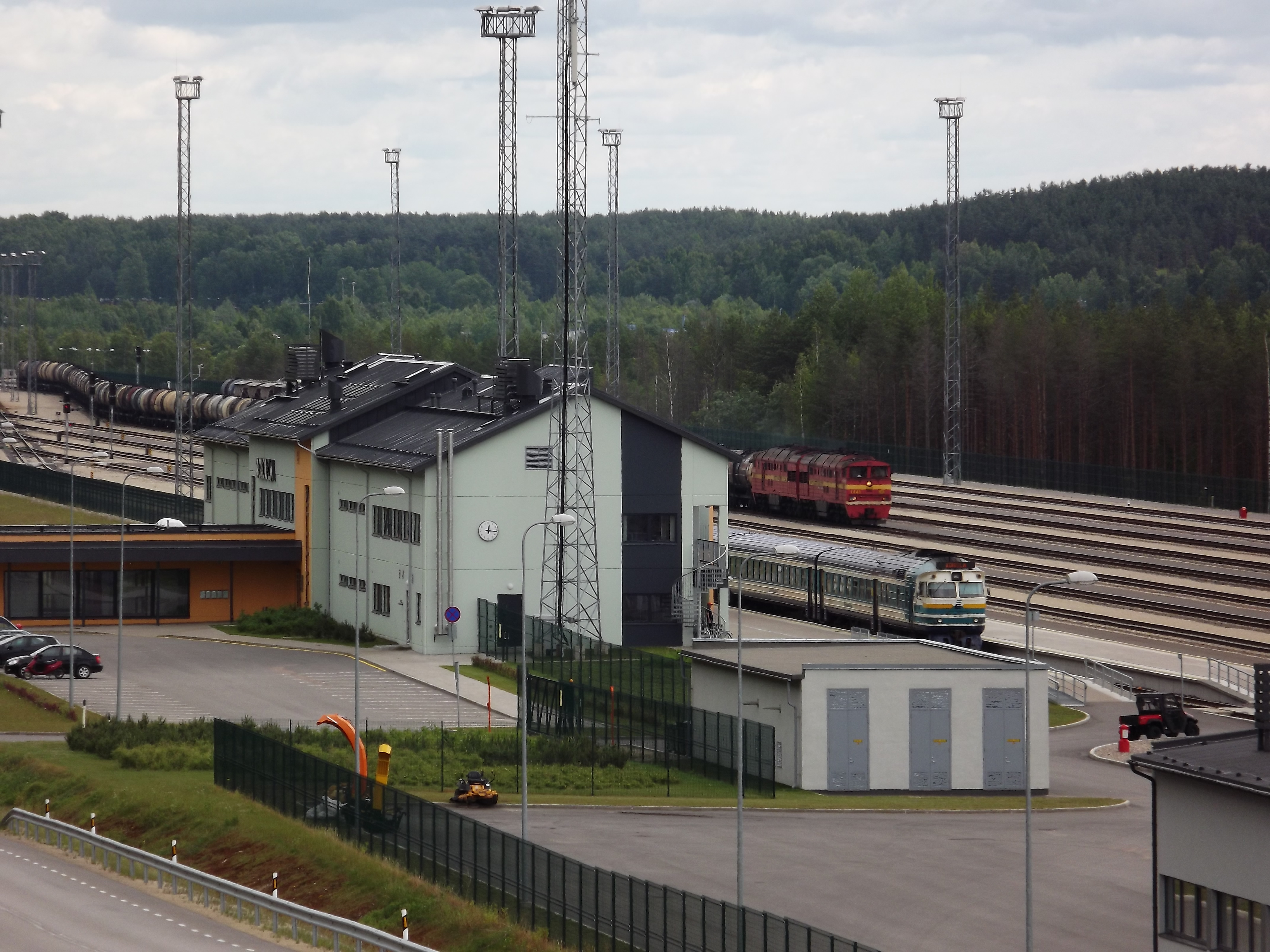 Koidula raudteepiirijaam